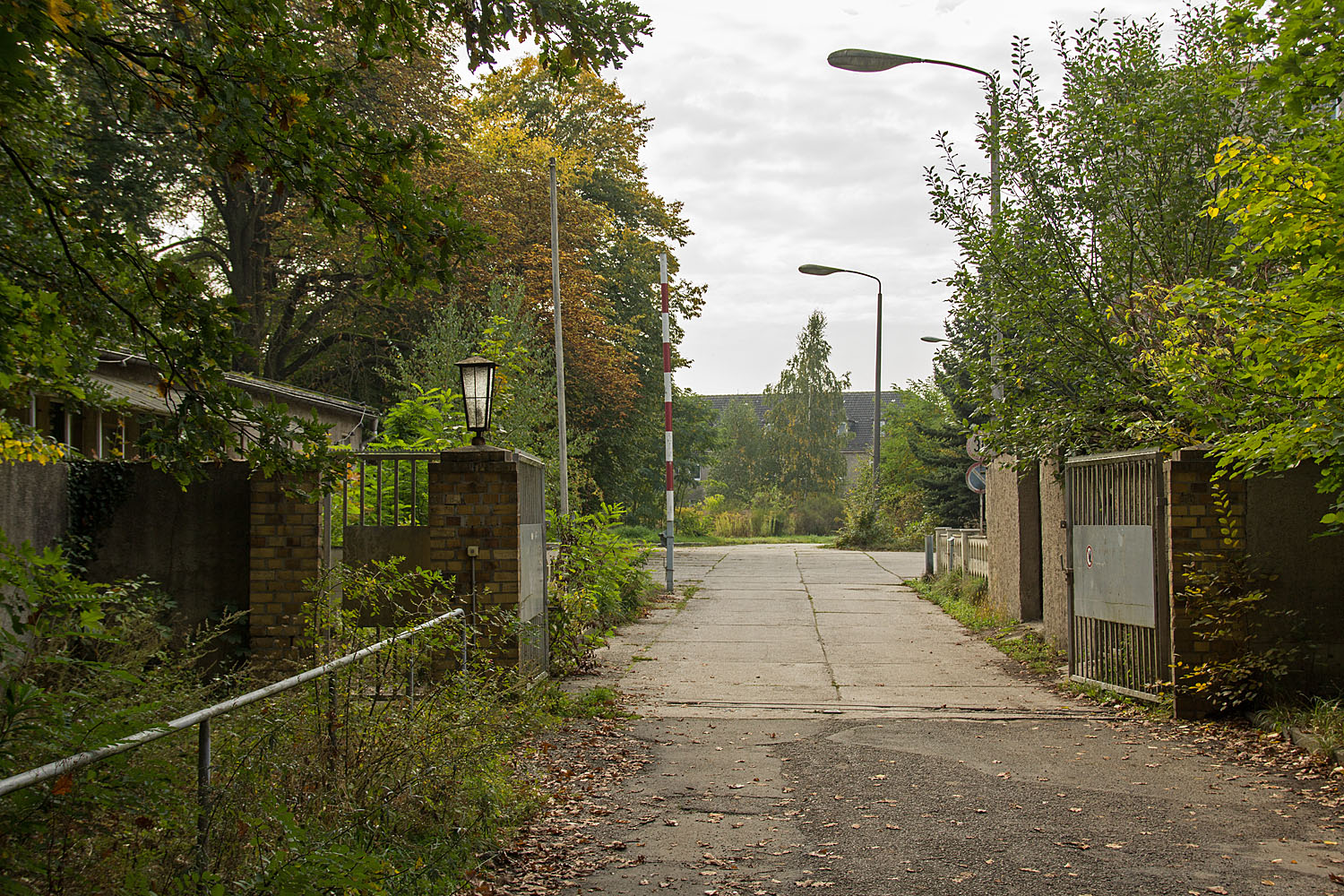 Heidekaserne Bad Düben OT Alaunwerk, Eingangstor 2017